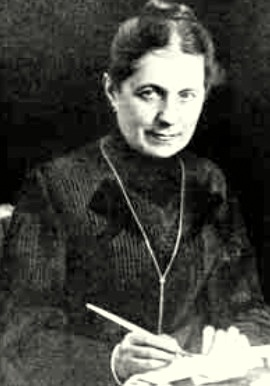 Marita Loersch, Gründerin mehrerer Frauenvereinigungen